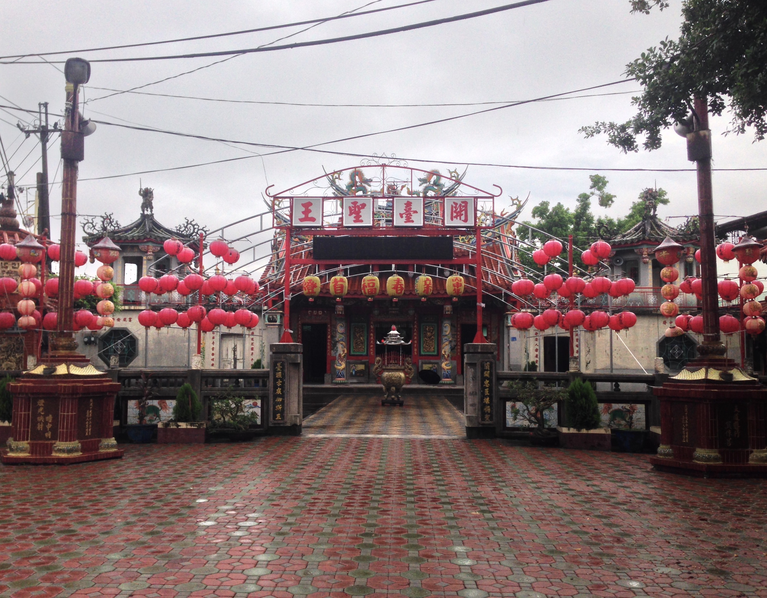 麟洛鄭成功廟